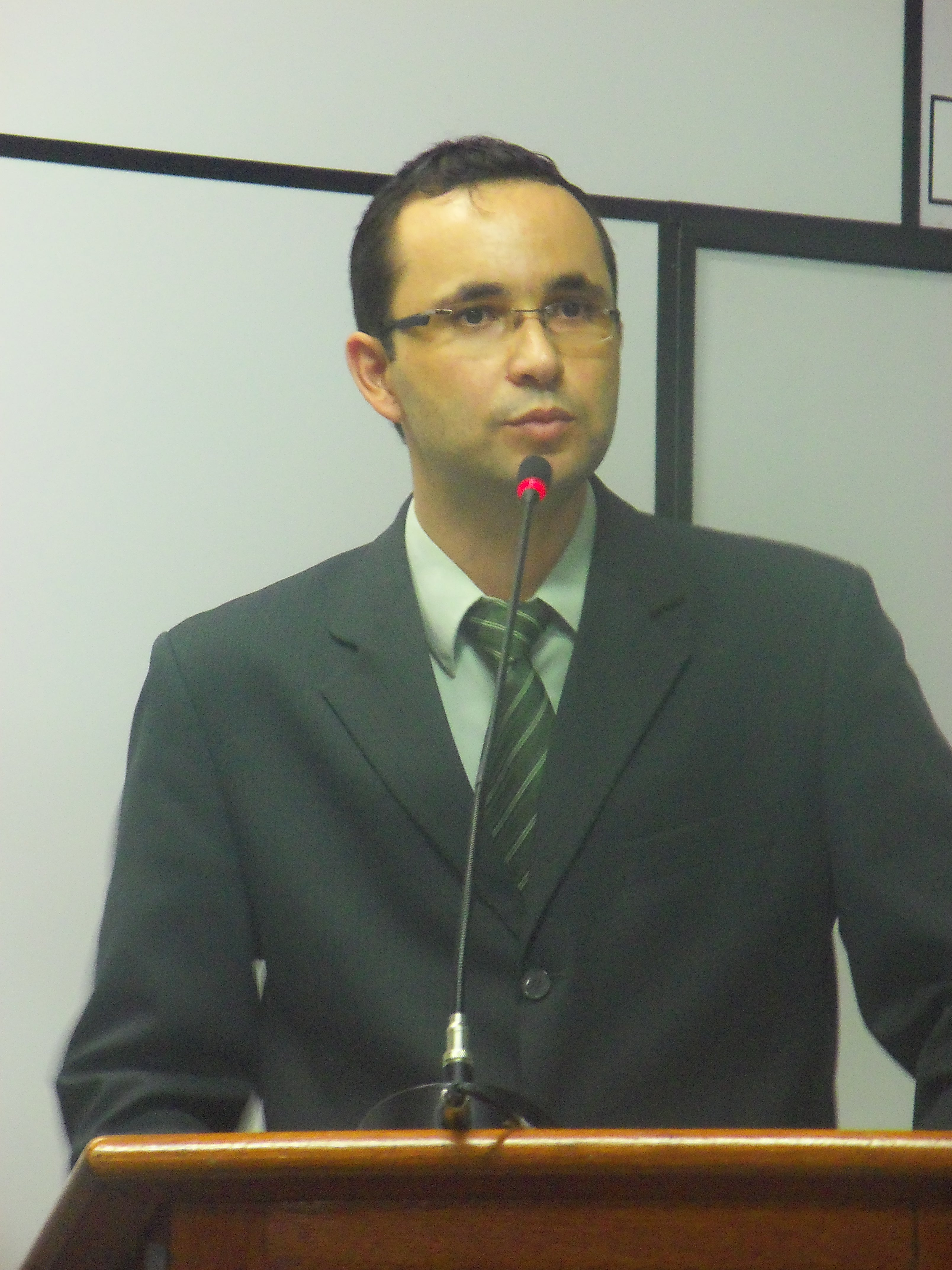 Vereador Claydson Pimentel Rodrigues, de Fundão (Espírito Santo)